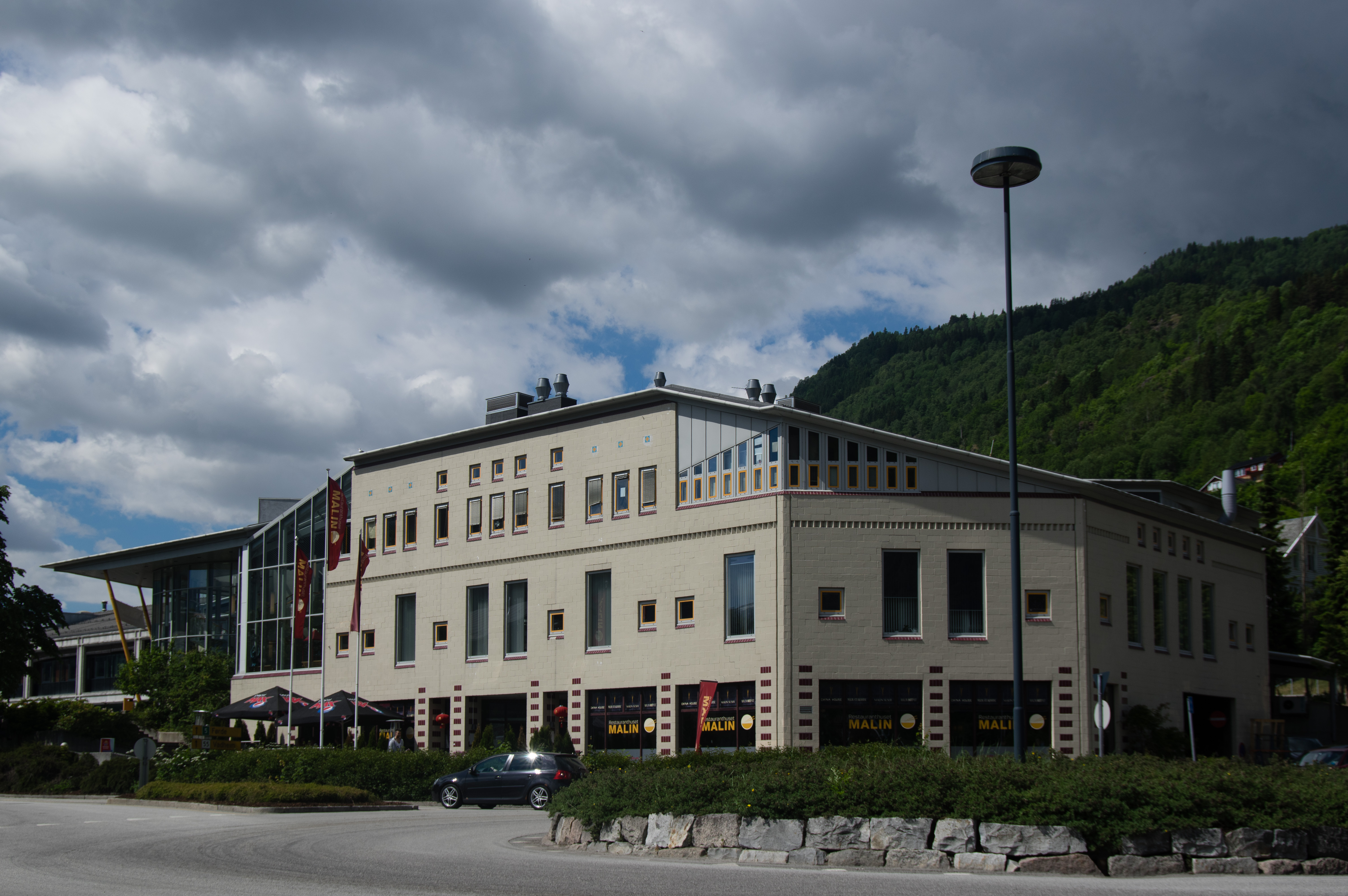 Sogndal kulturhus, som husar ein kinarestaurant i første høgda.